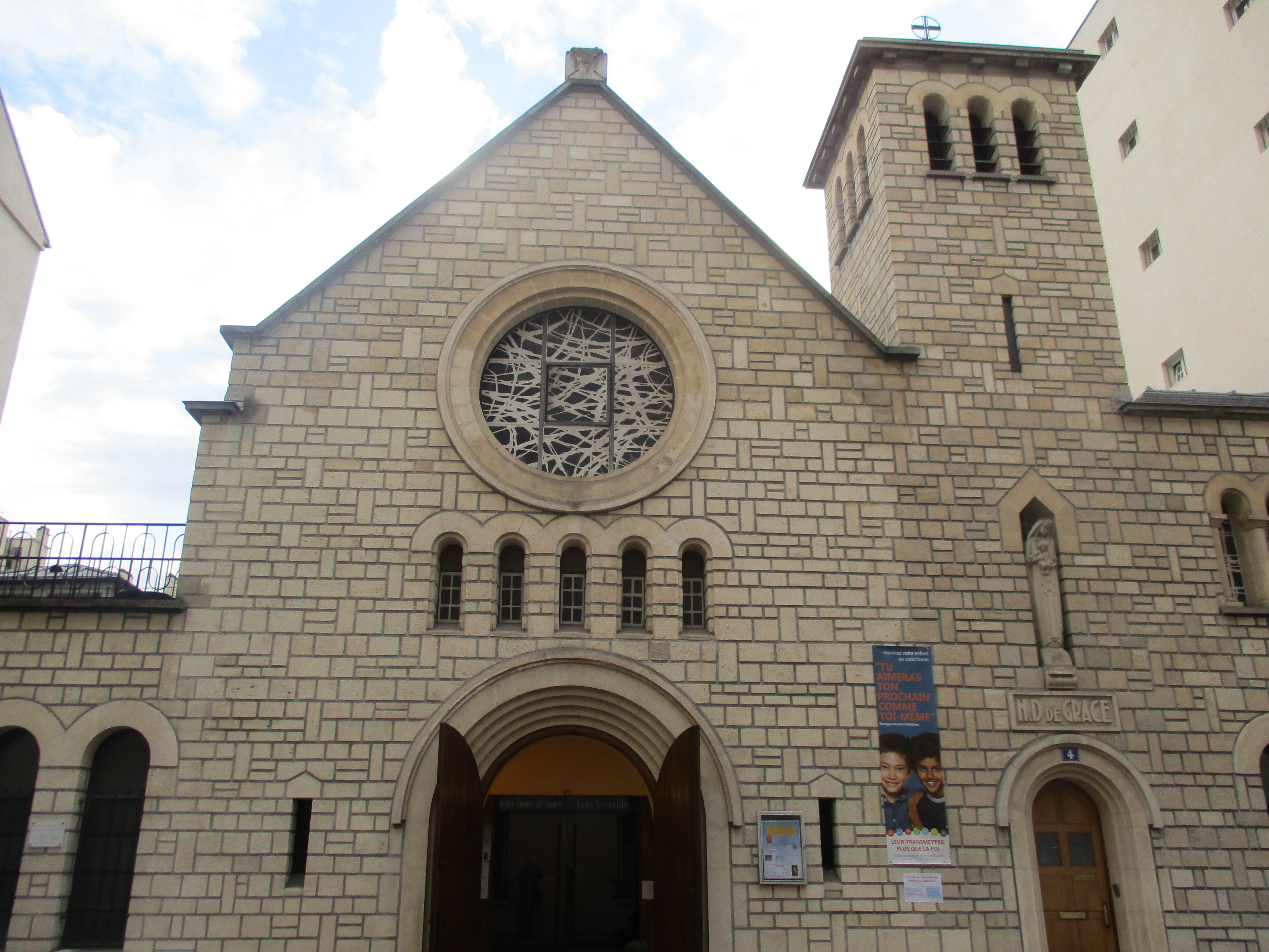 Chapelle Notre-Dame-de-Grâce de Grenelle, 6 rue Fondary (Paris XVe).